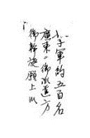 「娘子軍約五百名広東ニ御派遣方御斡旋願上候」 1938年11月4日付で陸軍省から内務省に慰安婦の徴集と中国への送り出しの依頼を行ったもの。 慰安所で働く女性を約500名広東に派遣するよう斡旋をお願い申し上げます。と書かれている。